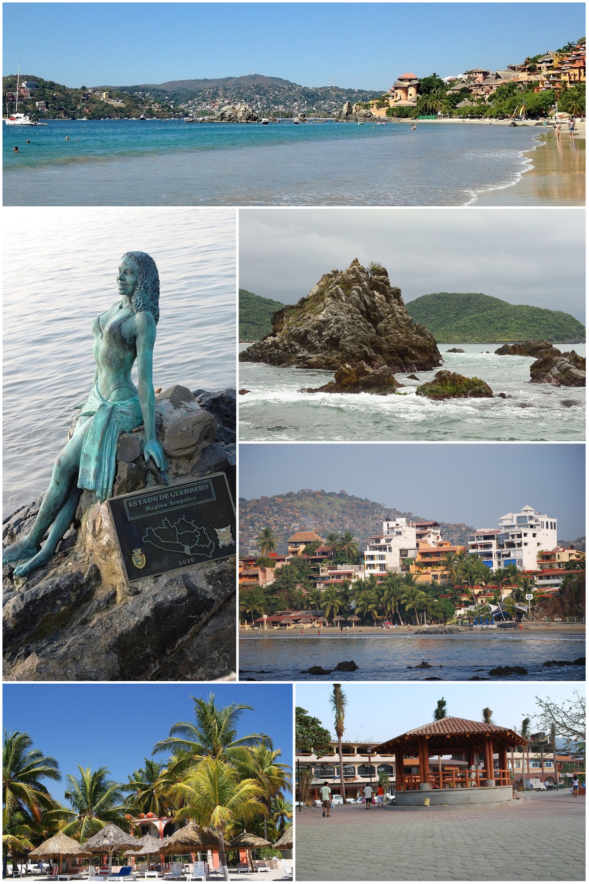 Zihuatanejo